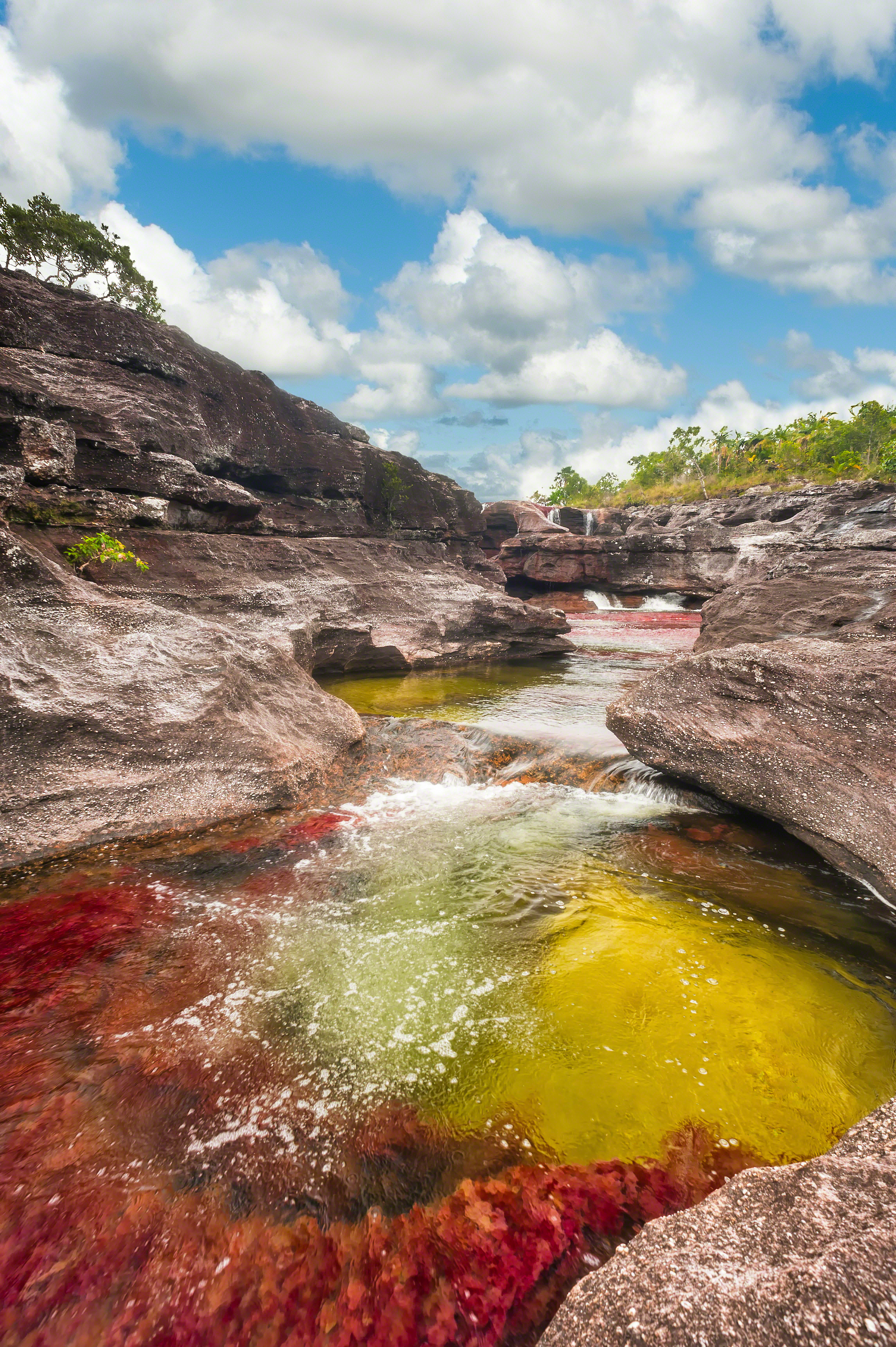 Un pequeño cañón, en Caño Cristales, en el sector conocido por los lugareños como “Los Ochos”, imponente belleza y colorido vibrante. Fotografía por Mario Carvajal, Licenciada con Creative Commons Reconocimiento 3.0 Unported. Usted puede usar esta imagen en cualquier proyecto, inclusive con fines comerciales, siempre y cuando otorgue el crédito de autoría y el vínculo hacia el proyecto de Caño Cristales, correctamente. (